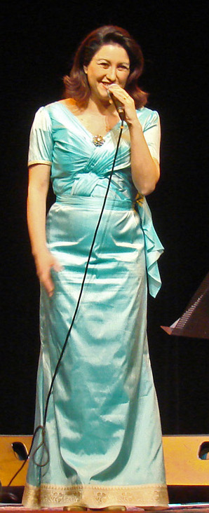 Sonia M'Barek, chanteuse tunisienne